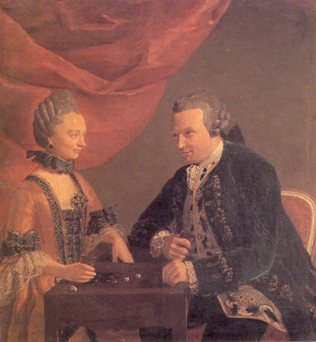 Joueurs de trictrac